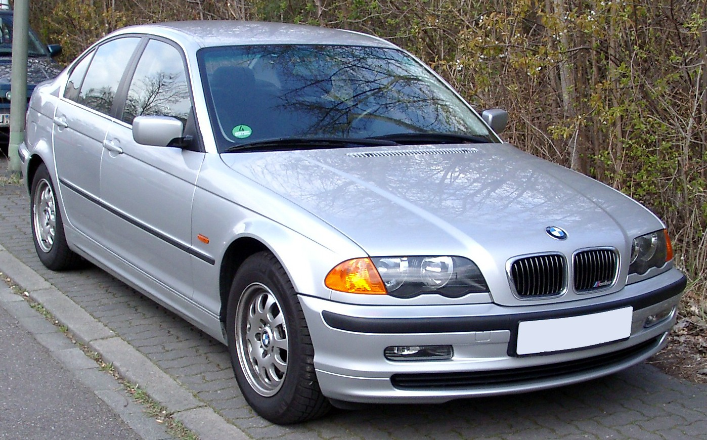 BMW E46